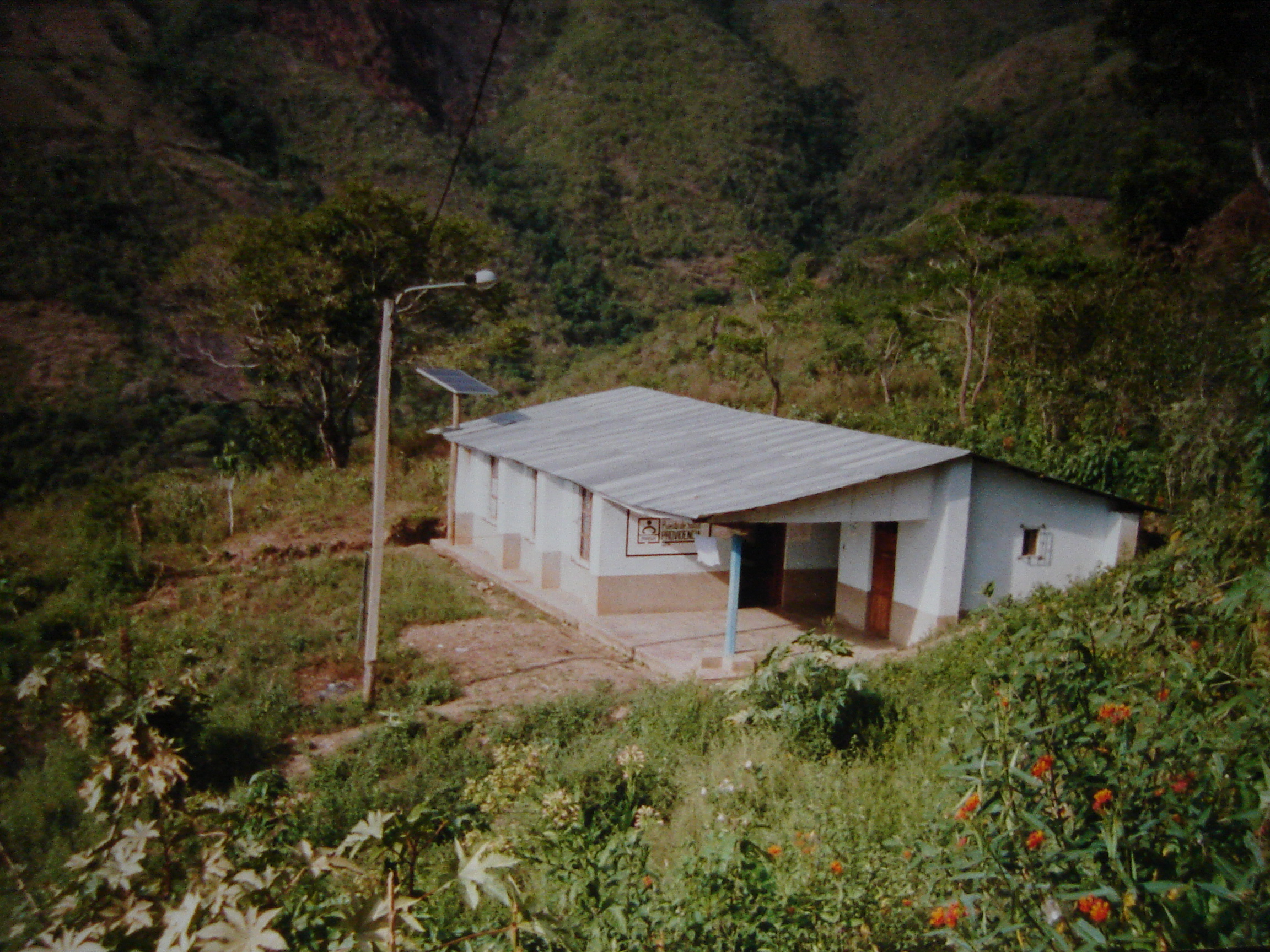 Puesto de Salud Providencia. Fotografía tomada el año 2000 por el Médico Jefe del Puesto quien realizaba su SERUMS